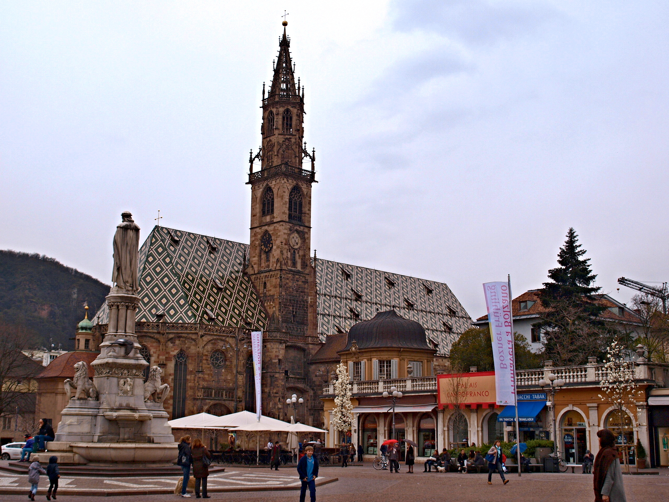 Bolzano